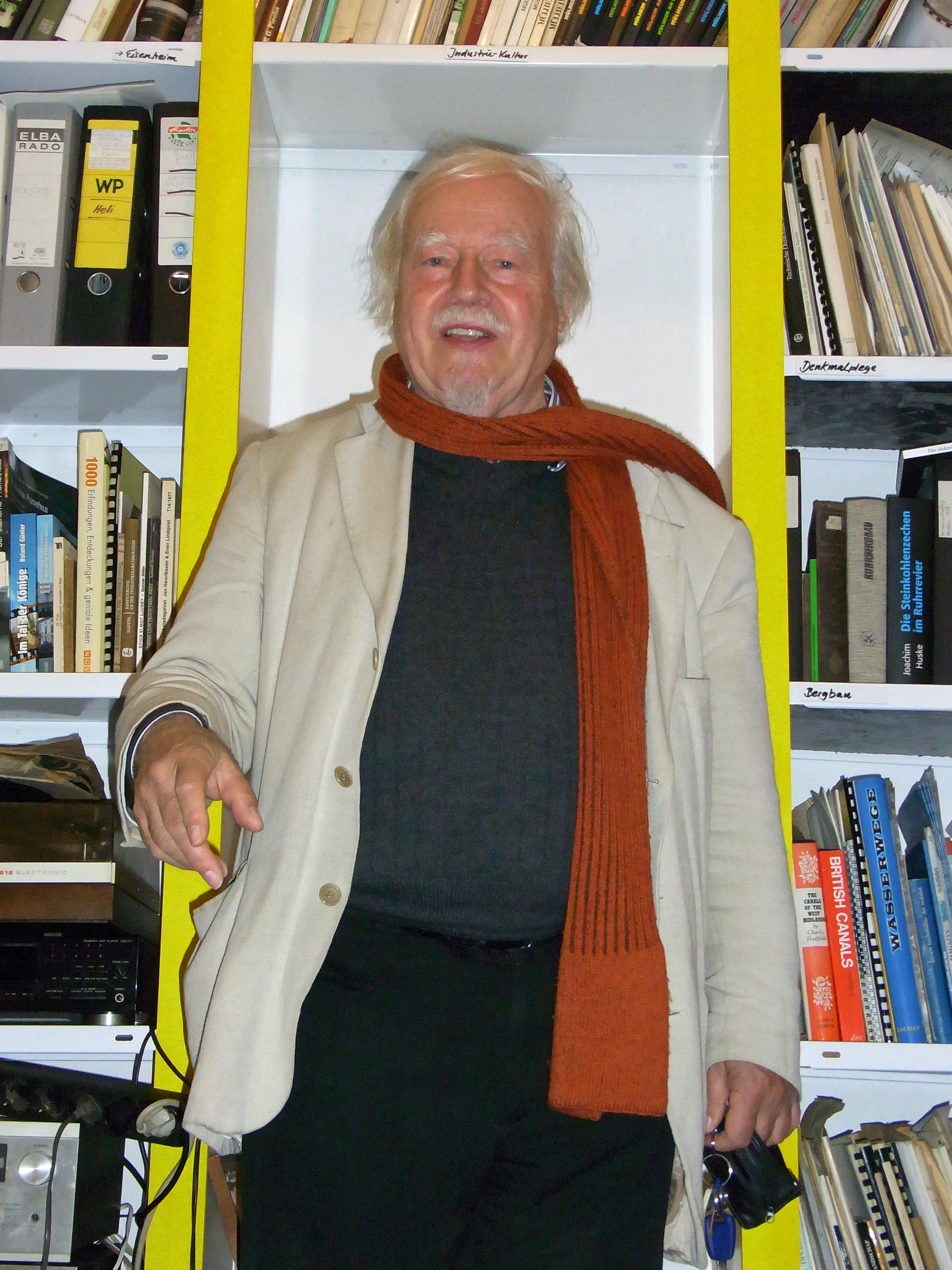 Siedlung Eisenheim Professor Roland Günter